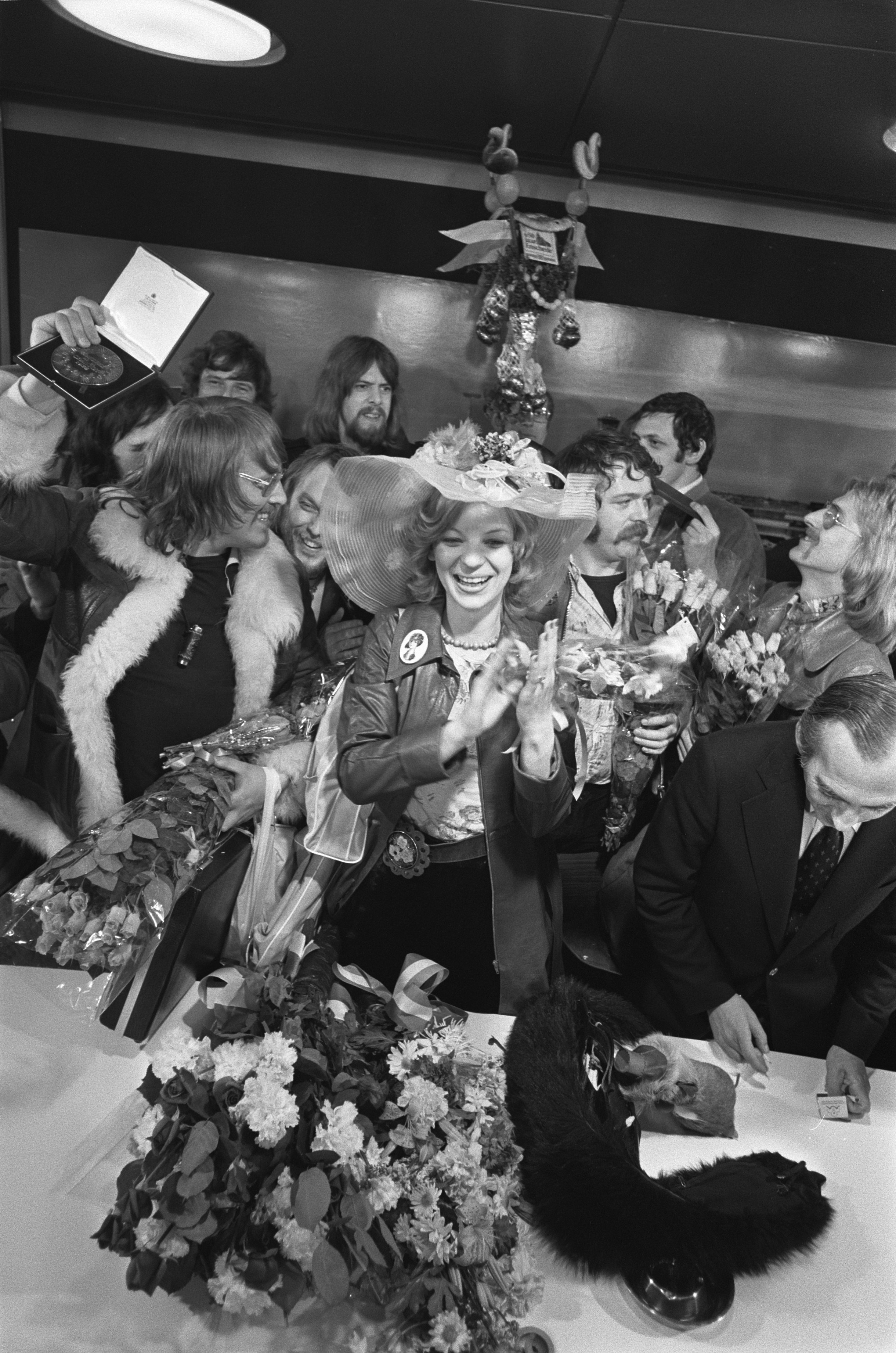 Collectie / Archief : Fotocollectie Anefo Reportage / Serie : [ onbekend ] Beschrijving : Teach in (winnaar Eurovisie Songfestival) terug op Schiphol; Teach in na aankomst Datum : 23 maart 1975 Trefwoorden : SONGFESTIVALS, Winnaars, aankomsten Persoonsnaam : Eurovisiesongfestival Instellingsnaam : Teach In Fotograaf : Mieremet, Rob / Anefo Auteursrechthebbende : Nationaal Archief Materiaalsoort : Negatief (zwart/wit) Nummer archiefinventaris : bekijk toegang 2.24.01.05 Bestanddeelnummer : 927-8212